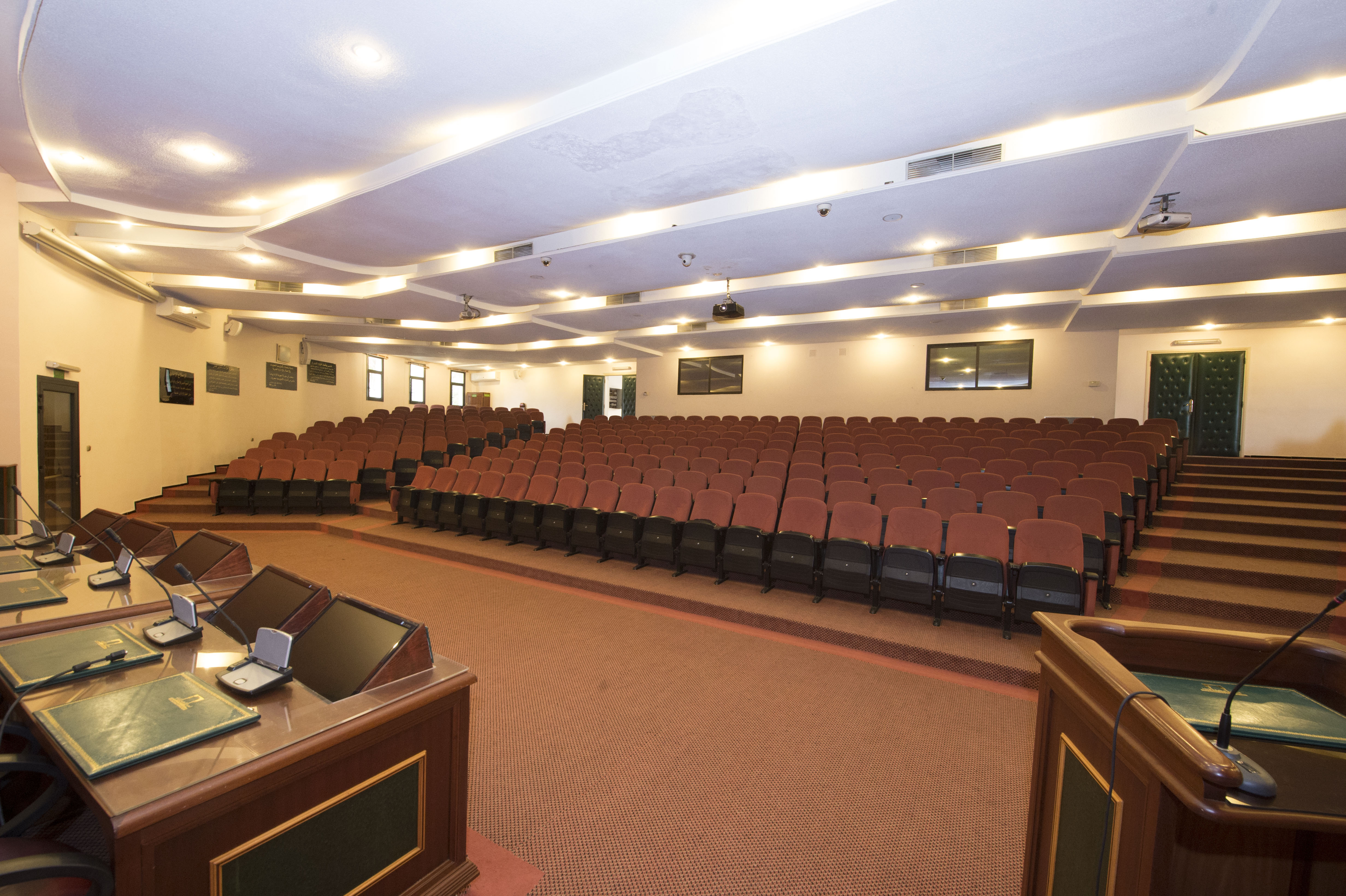 L'amphithéâtre de l’École Nationale Supérieure de l'Administration - Rabat Maroc